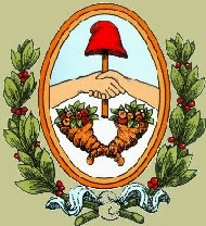 Escudo municipal de Maipu, mendoza